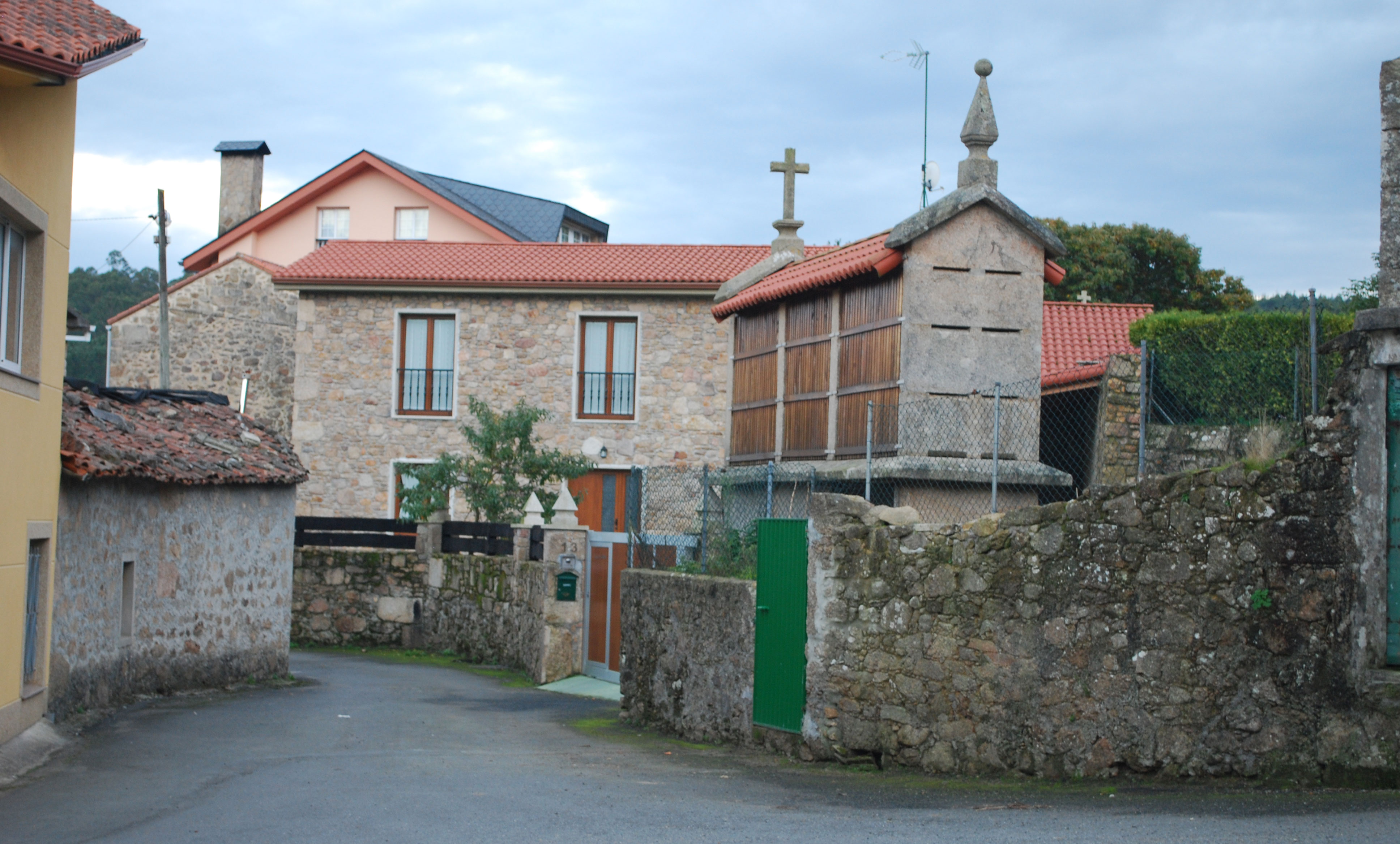 Vista de Cazobre (zona urbana) Morás Arteixo A Coruña Galiza Spain